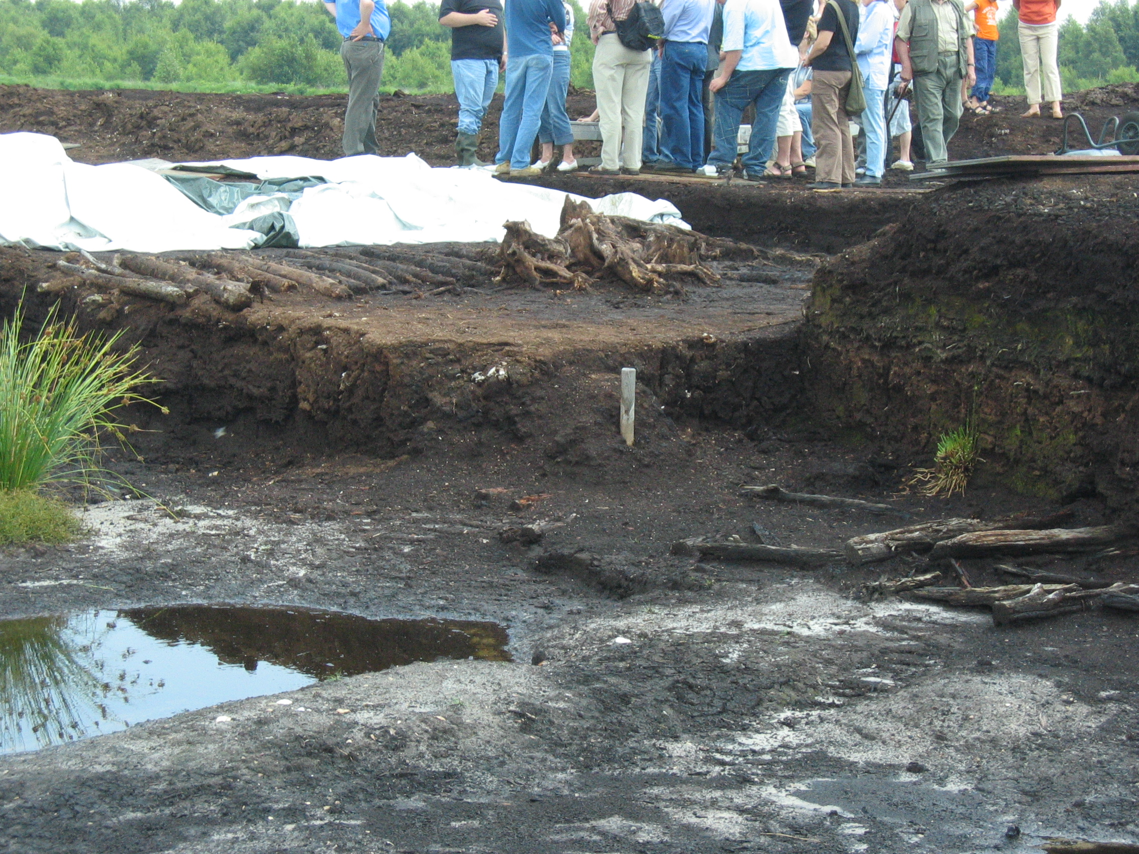 Hier sind 3 Grabungsebenen zu sehen, die jede einen Bohlenweg enthält. Die oberste Ebene ist die mit den Menschen (Führung)